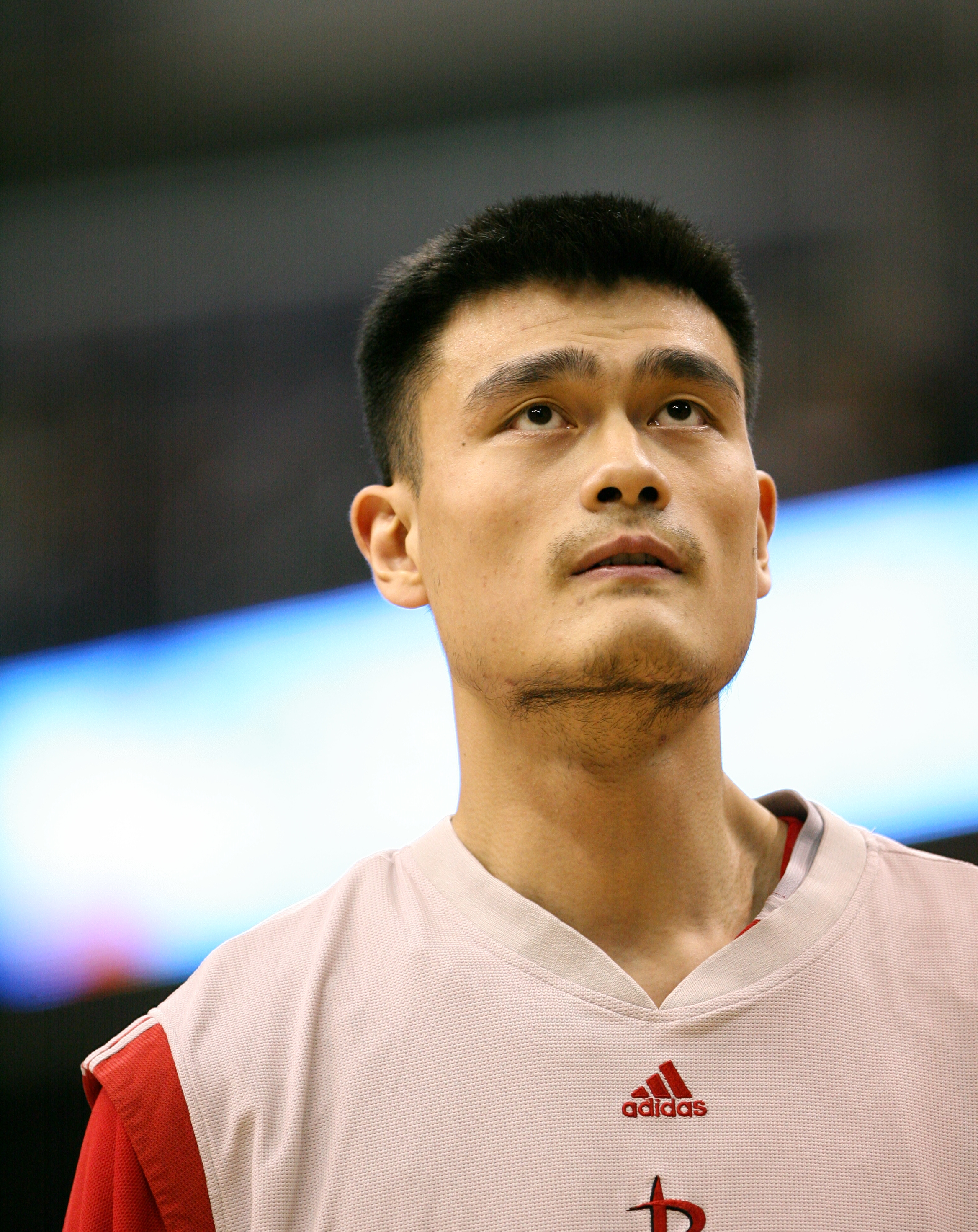 Yao Ming